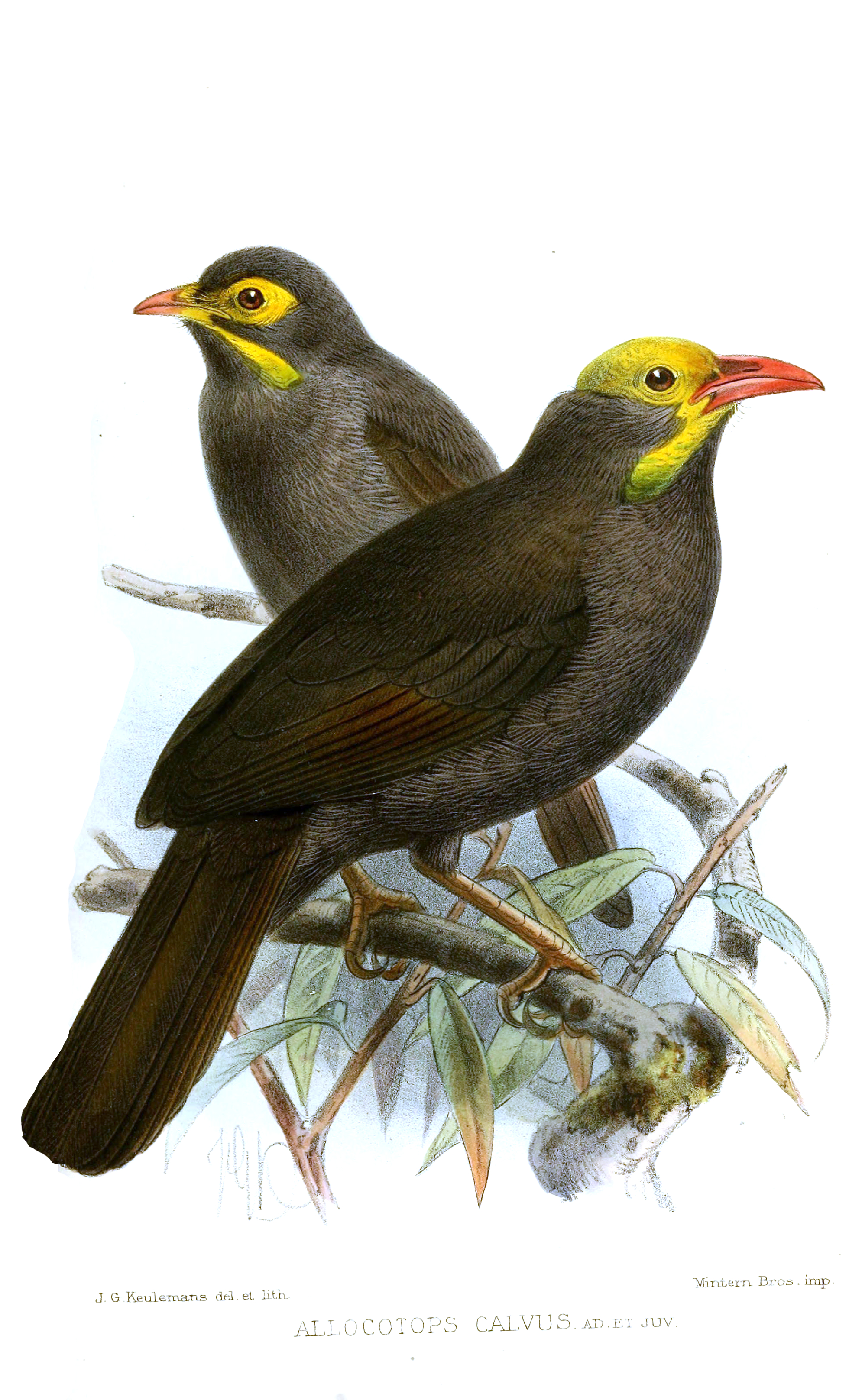 Allocotops calvus =Garrulax calvus